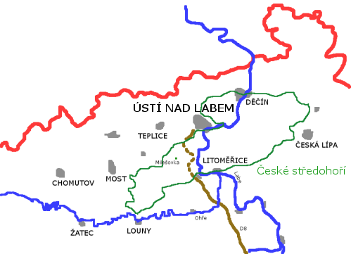 Mapa Českého středohoří.